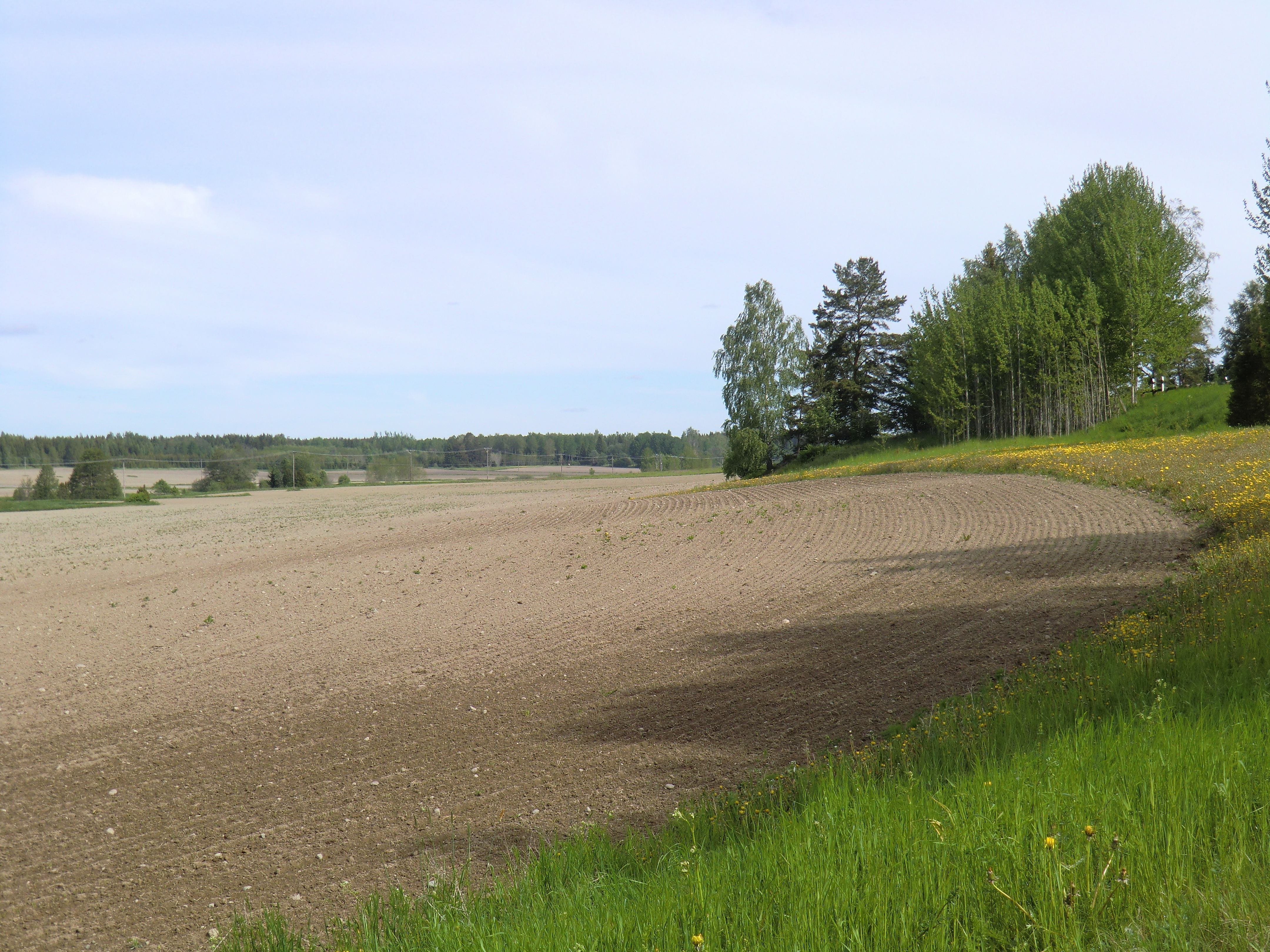 Öppet odlingslandskap vid Lena kyrka.